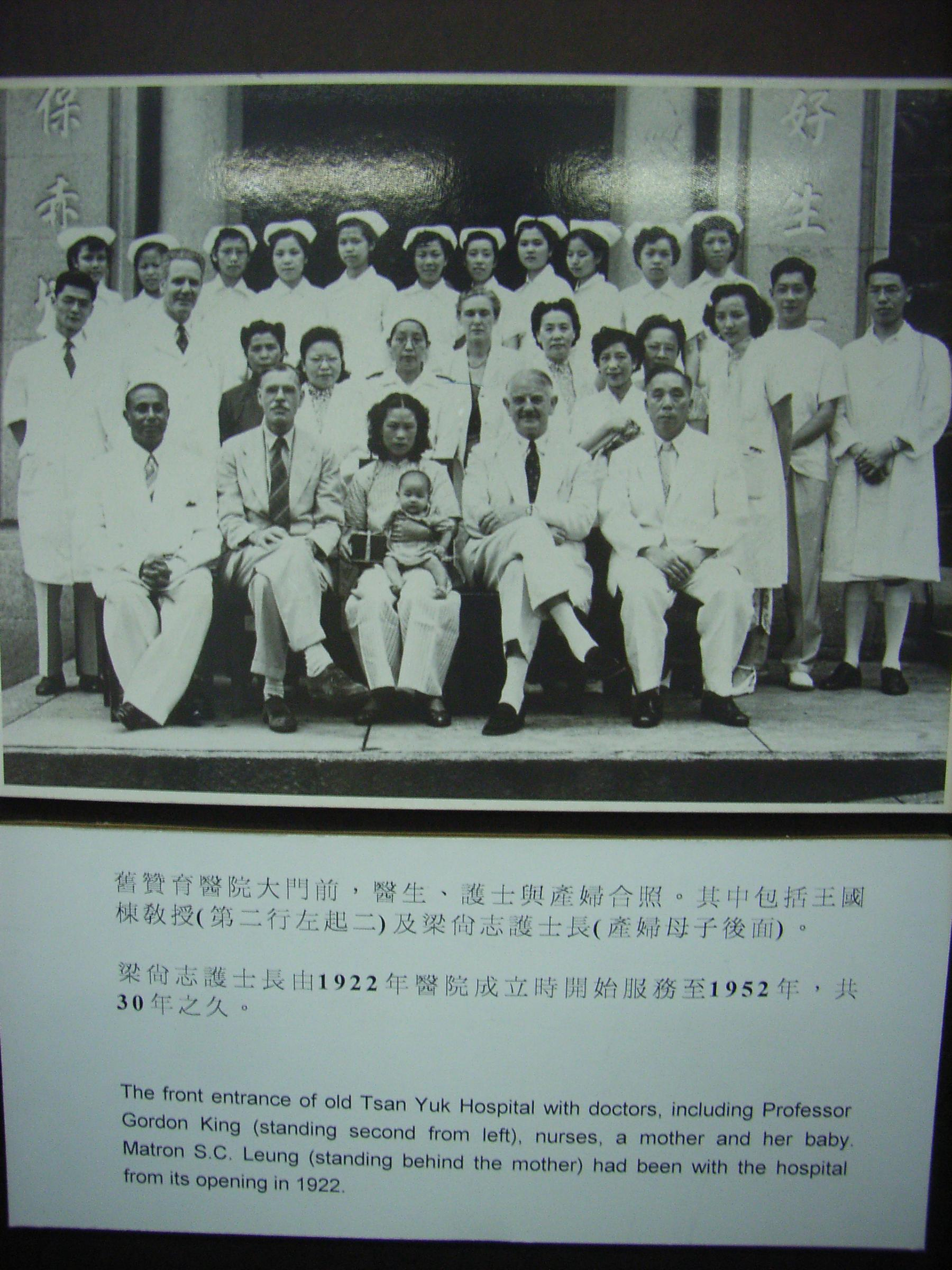 香港zh:公共醫療zh:歷史之zh:贊育醫院